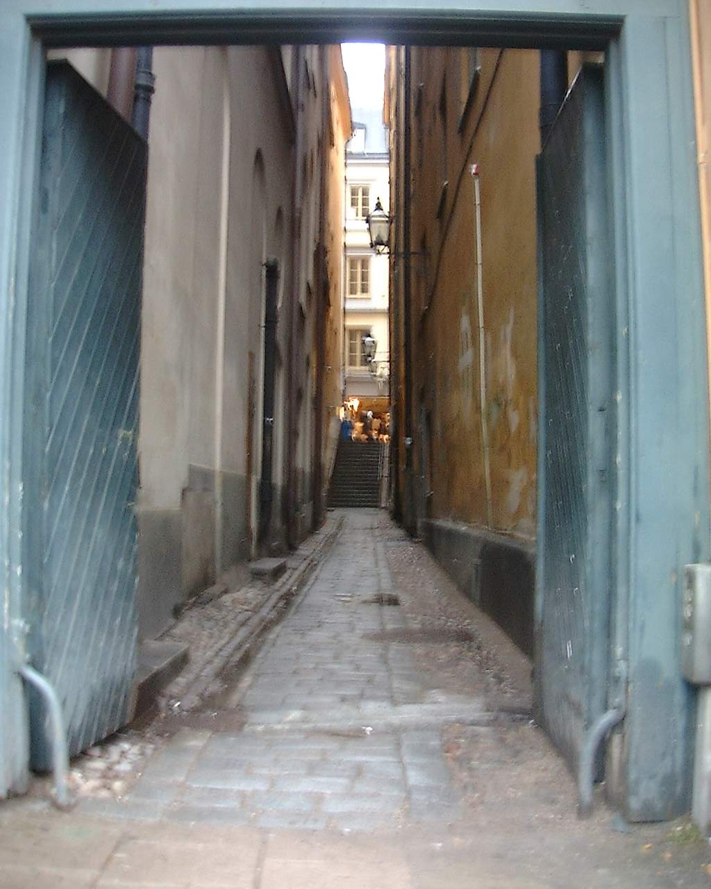 Torgdragargränd, Gamla stan, Stockholm